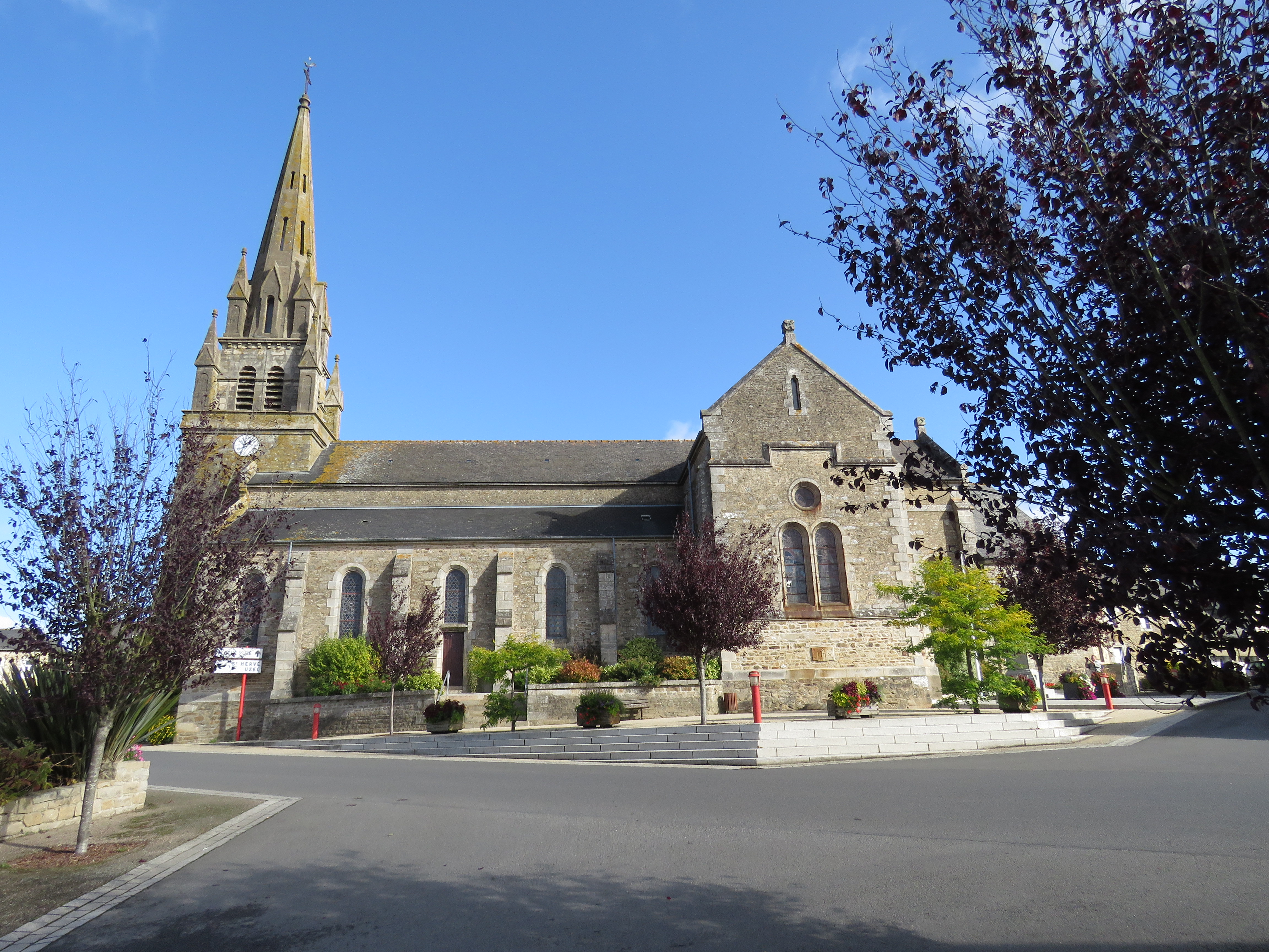 Église Saint-Étienne de Gausson.